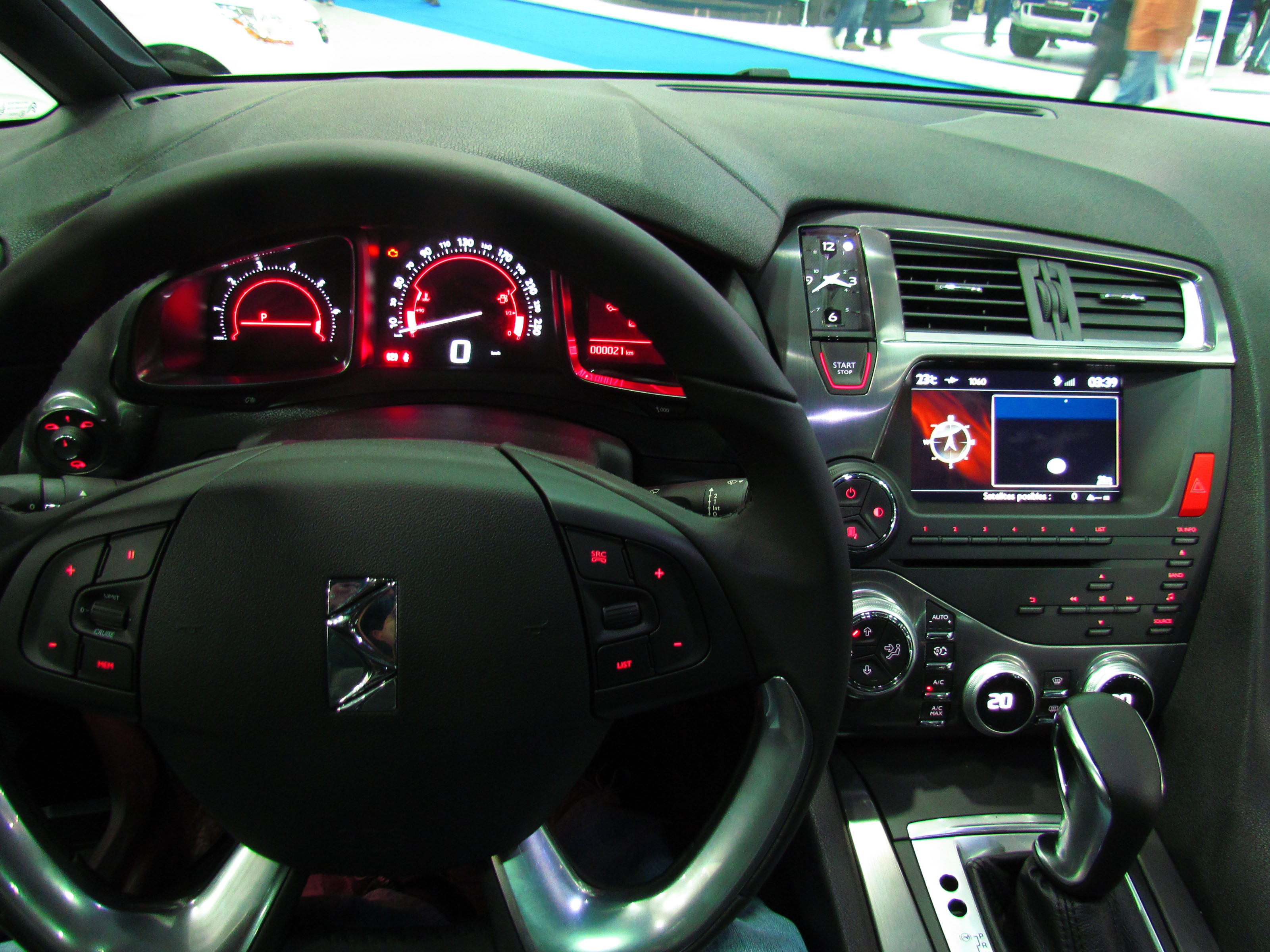 Citroen DS5